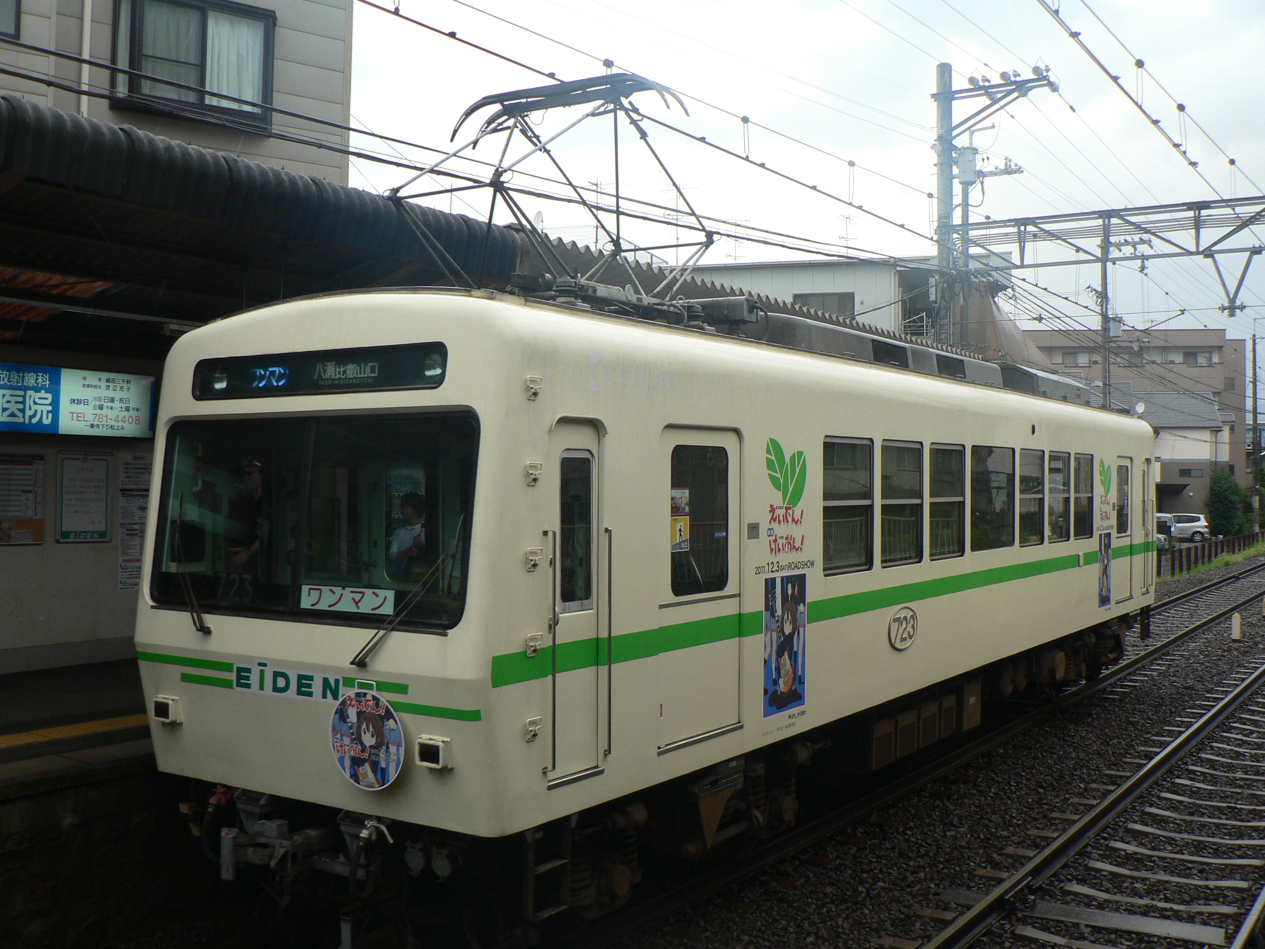 一乗寺駅を発車する映画けいおん!ラッピングを施されたデオ723号車。